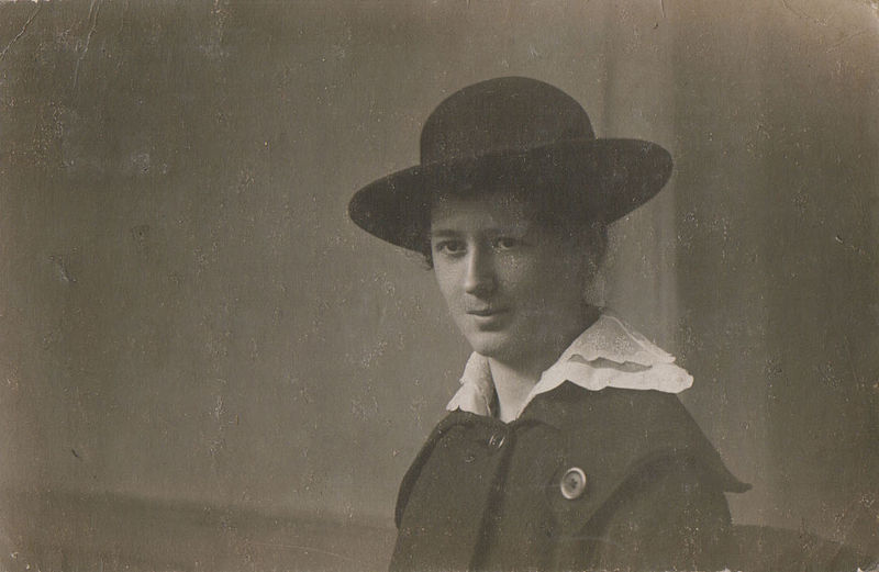 Natalija Petrić.